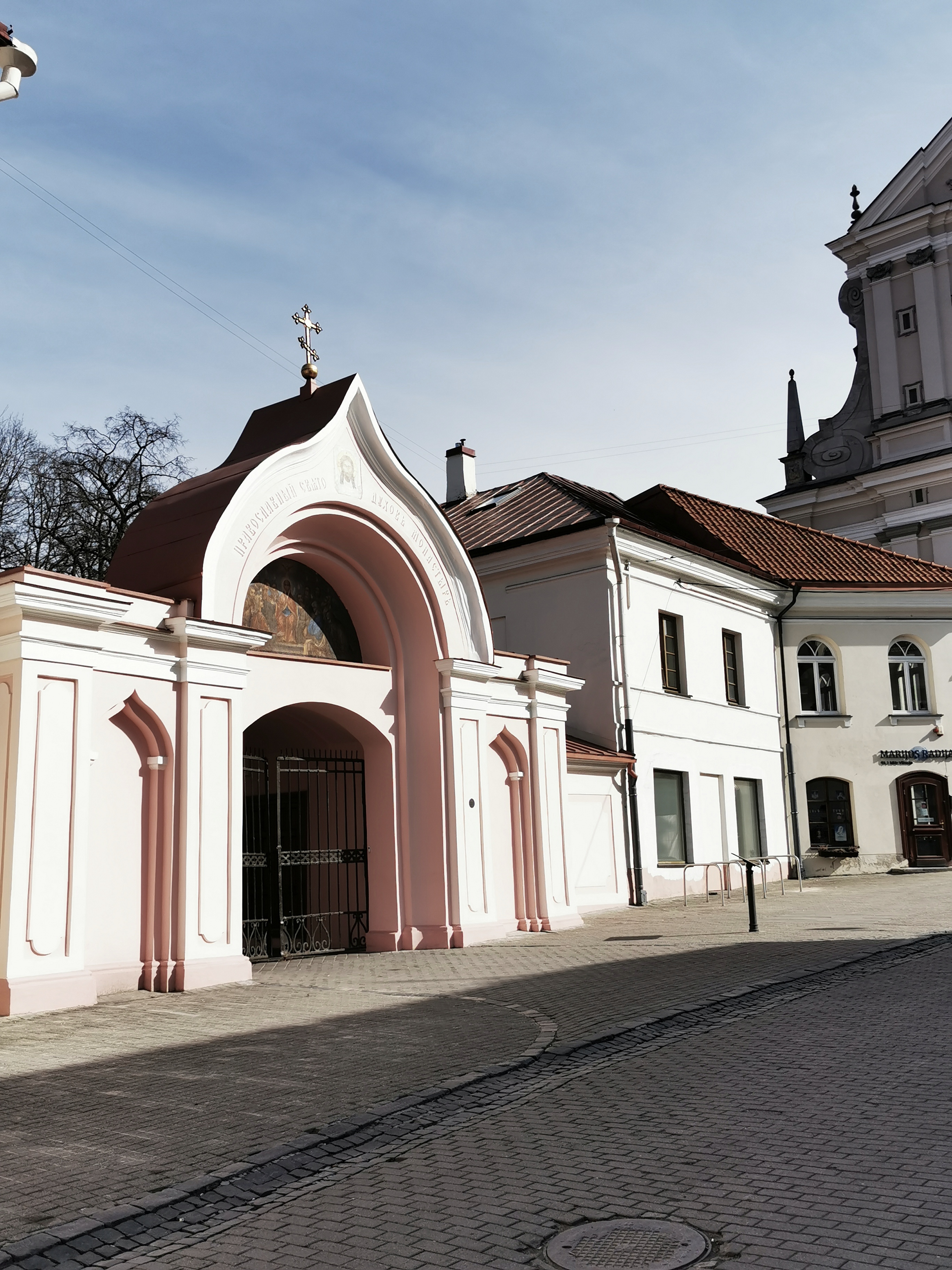 Šv. Dvasoos cerkvės ir vienuolyno vartai